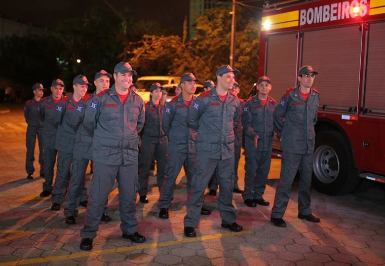 Formatura de turma de Bombeiro Comunitário de Santa Catarina - Tubarão/SC